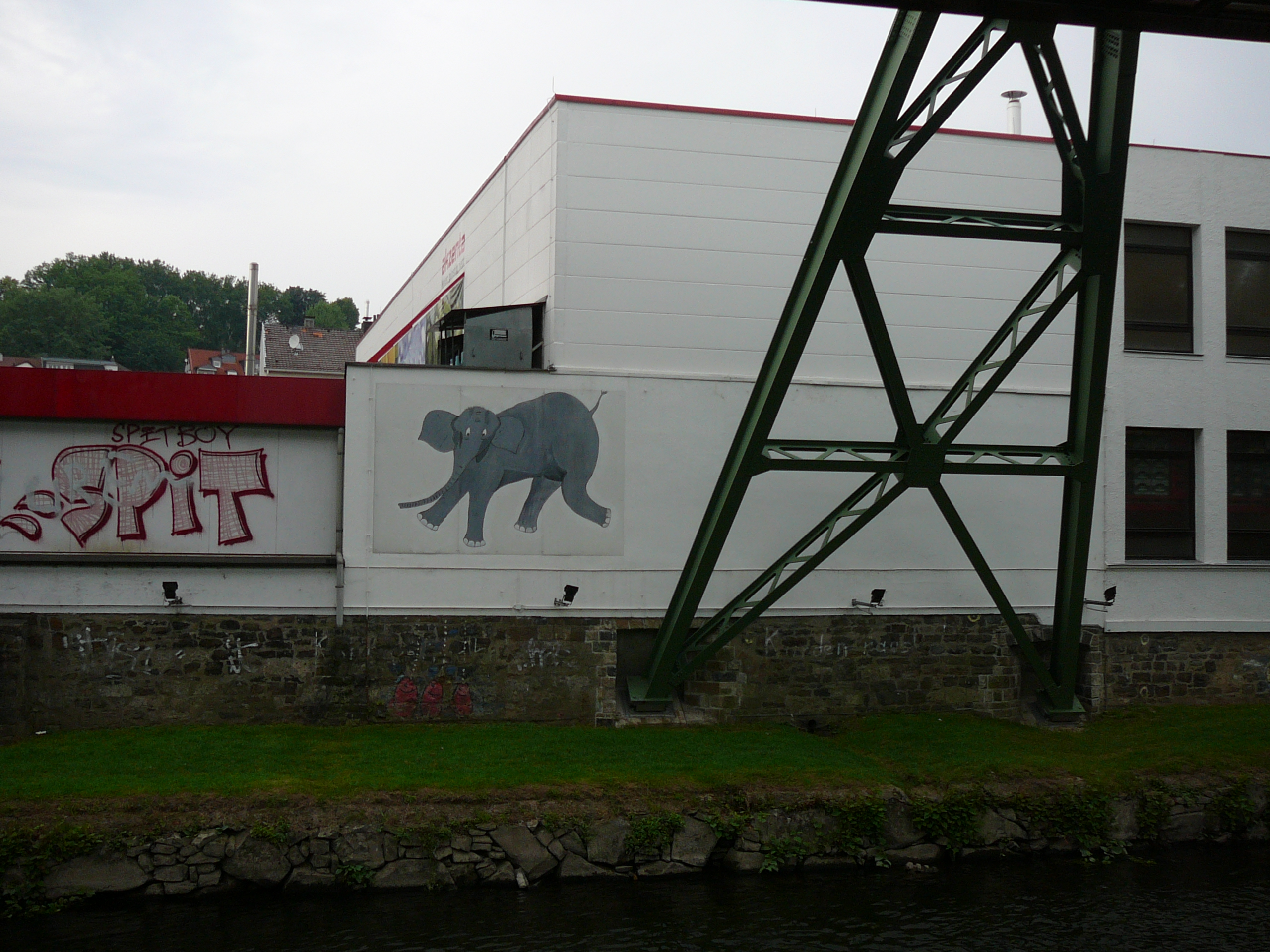 Friedrich-Engels-Allee, Wuppertal